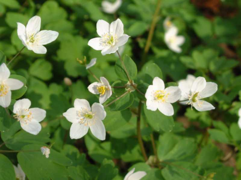 Galambvirág (Isopyrum thalictroides). Saját fotóm. Veszprém, 1990.